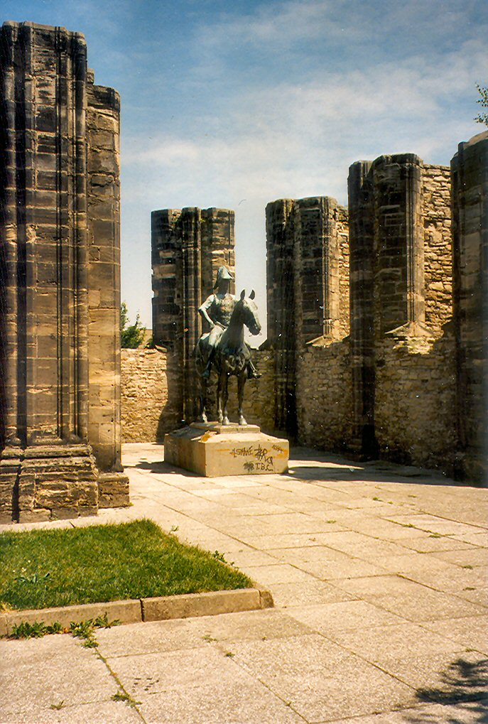 Merseburg: Das Reiterstandbild des preußischen Königs Friedrich Wilhelm III. in der Kirchenruine St. Sixti (1995)